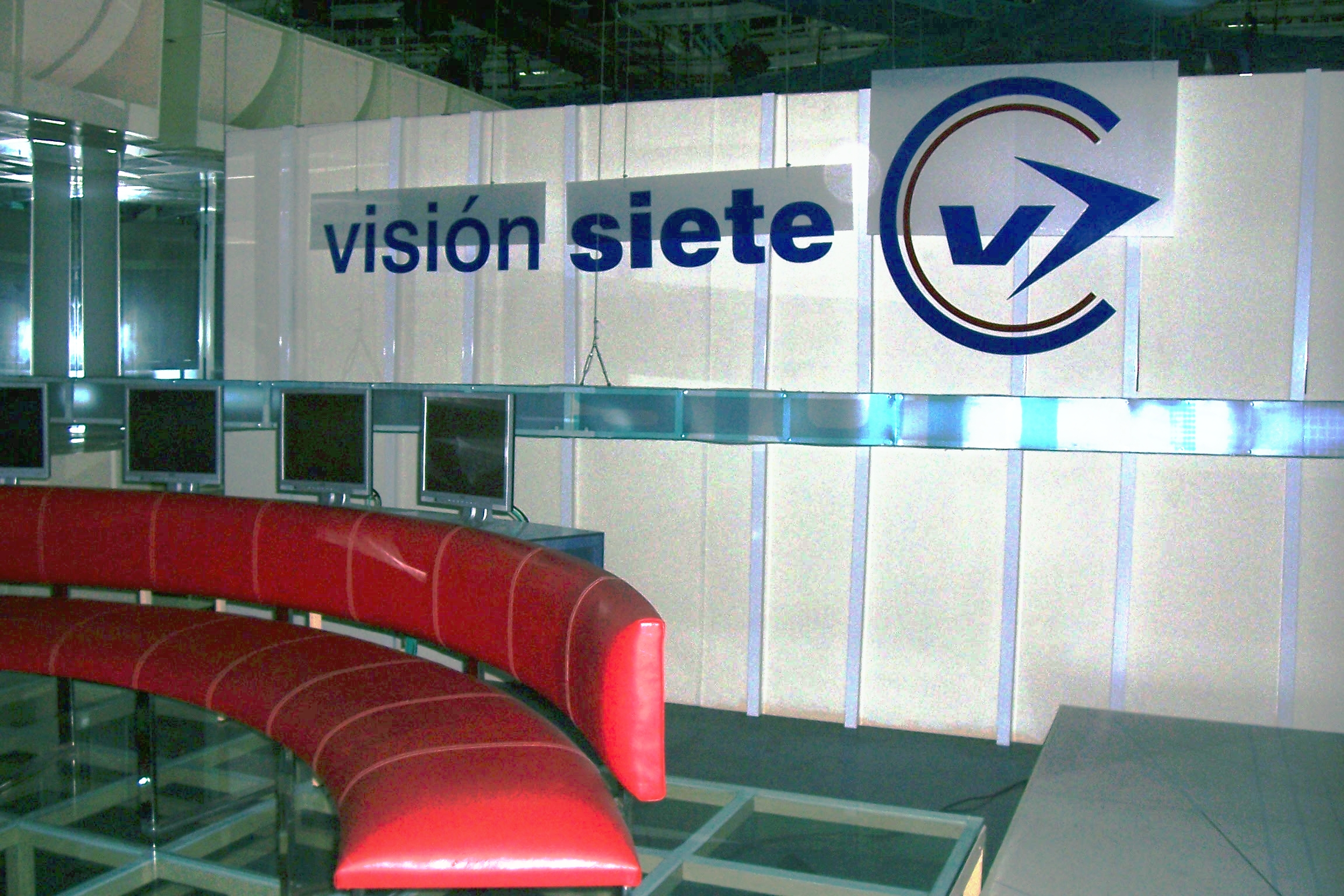 El Estudio de Visión Siete Noticias (V7), el noticiero de Canal 7 Argentina. Agradecimientos: Hugo Barcia, Subgerente de Relaciones Institucionales y Prensa. Canal 7 Argentina.